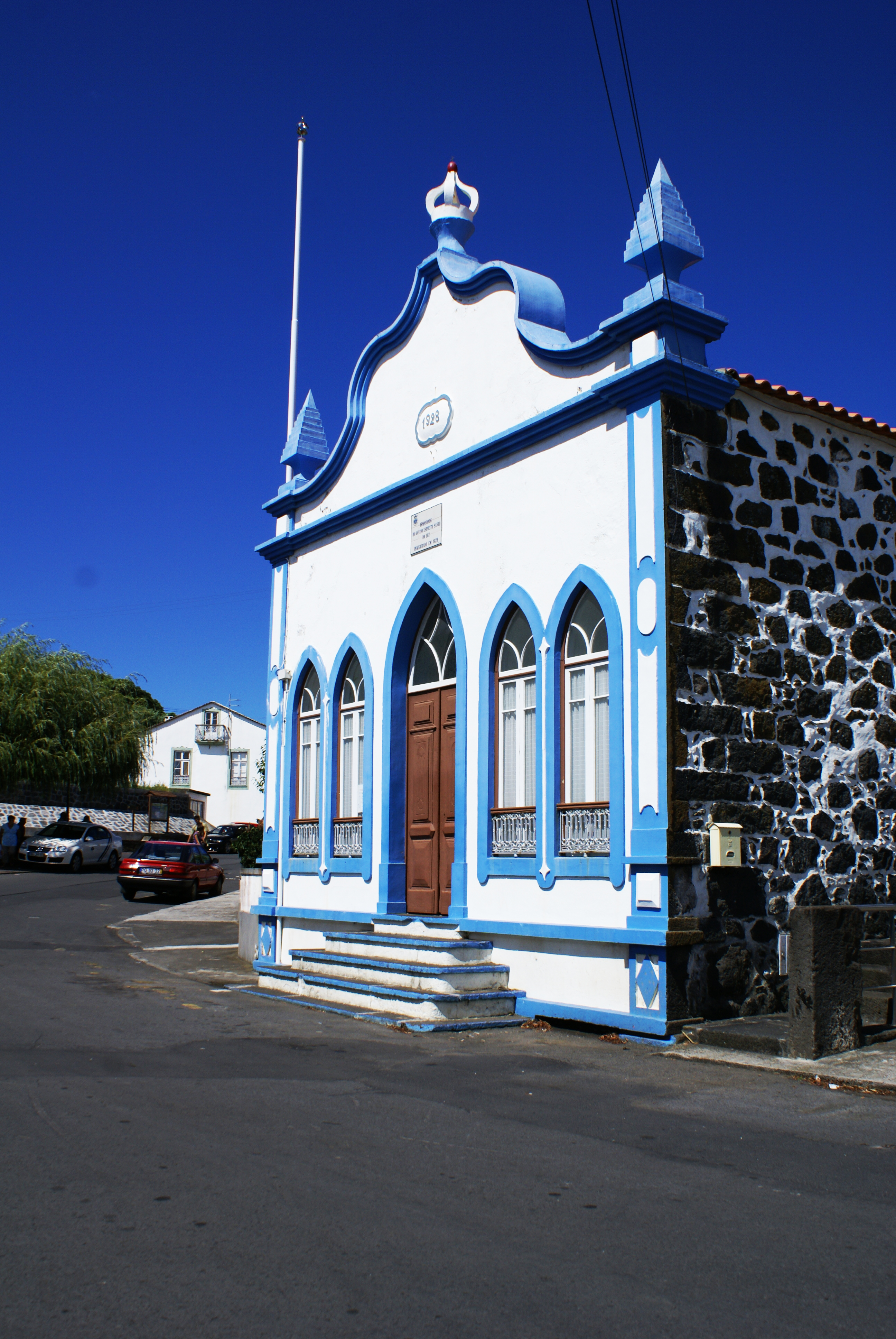 Império do Espírito Santo da Luz, Santa Cruz da Graciosa, ilha Graciosa, Açores, Portugal